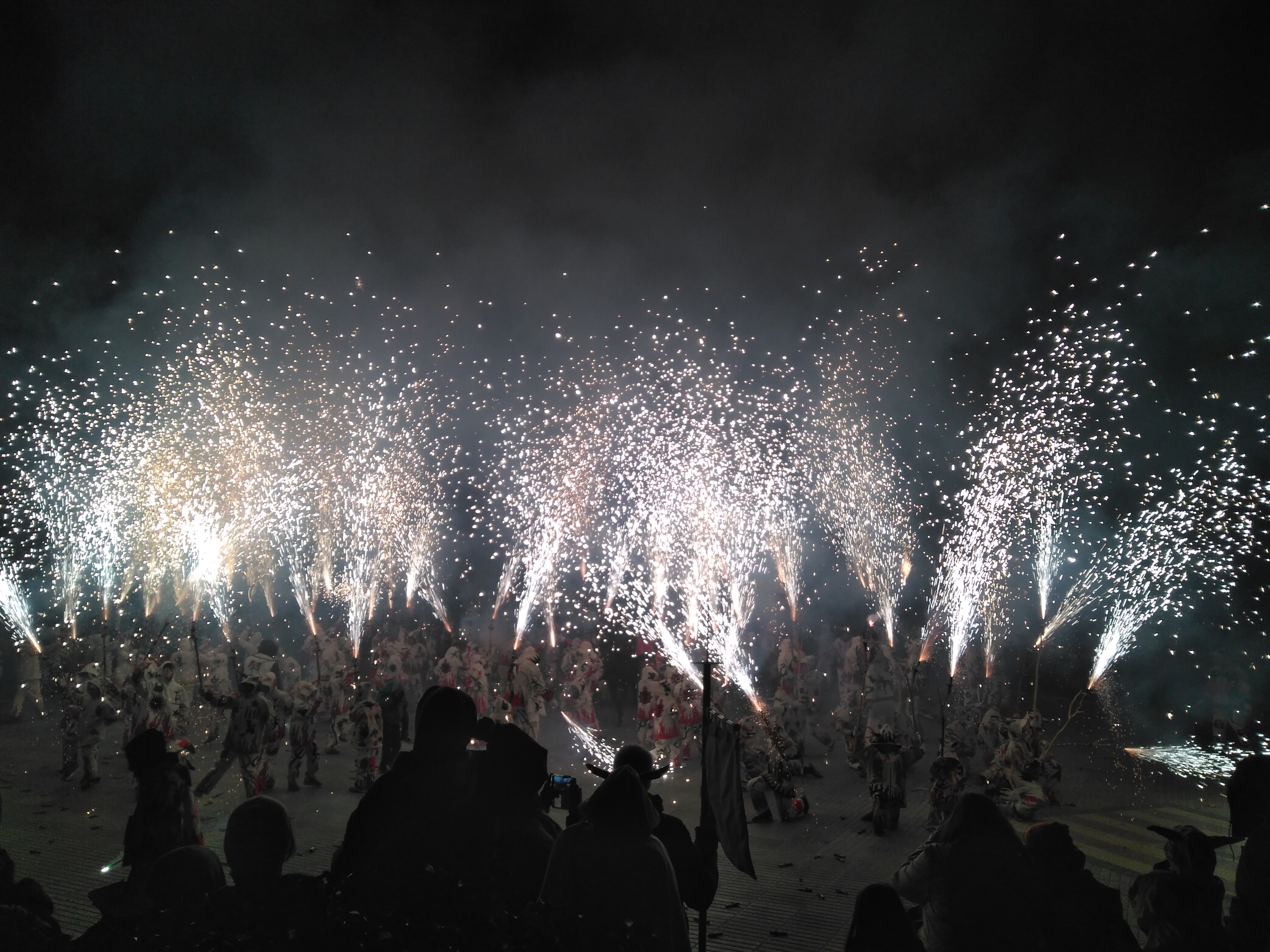 Correfoc de la Colla de Diables de Riudoms amb motiu de la festa major d'hivern de Sant Sebastià